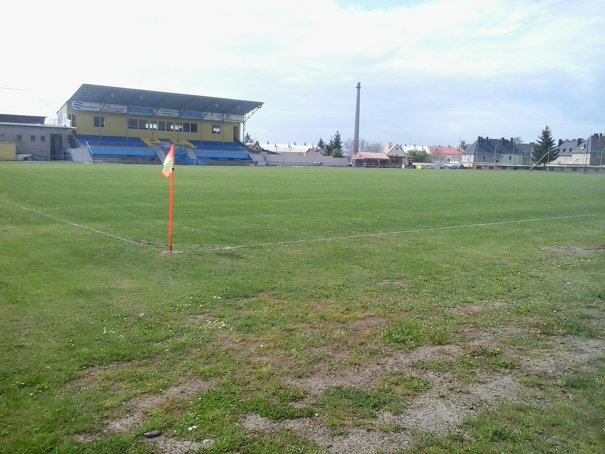 Stadion FK Šternberk